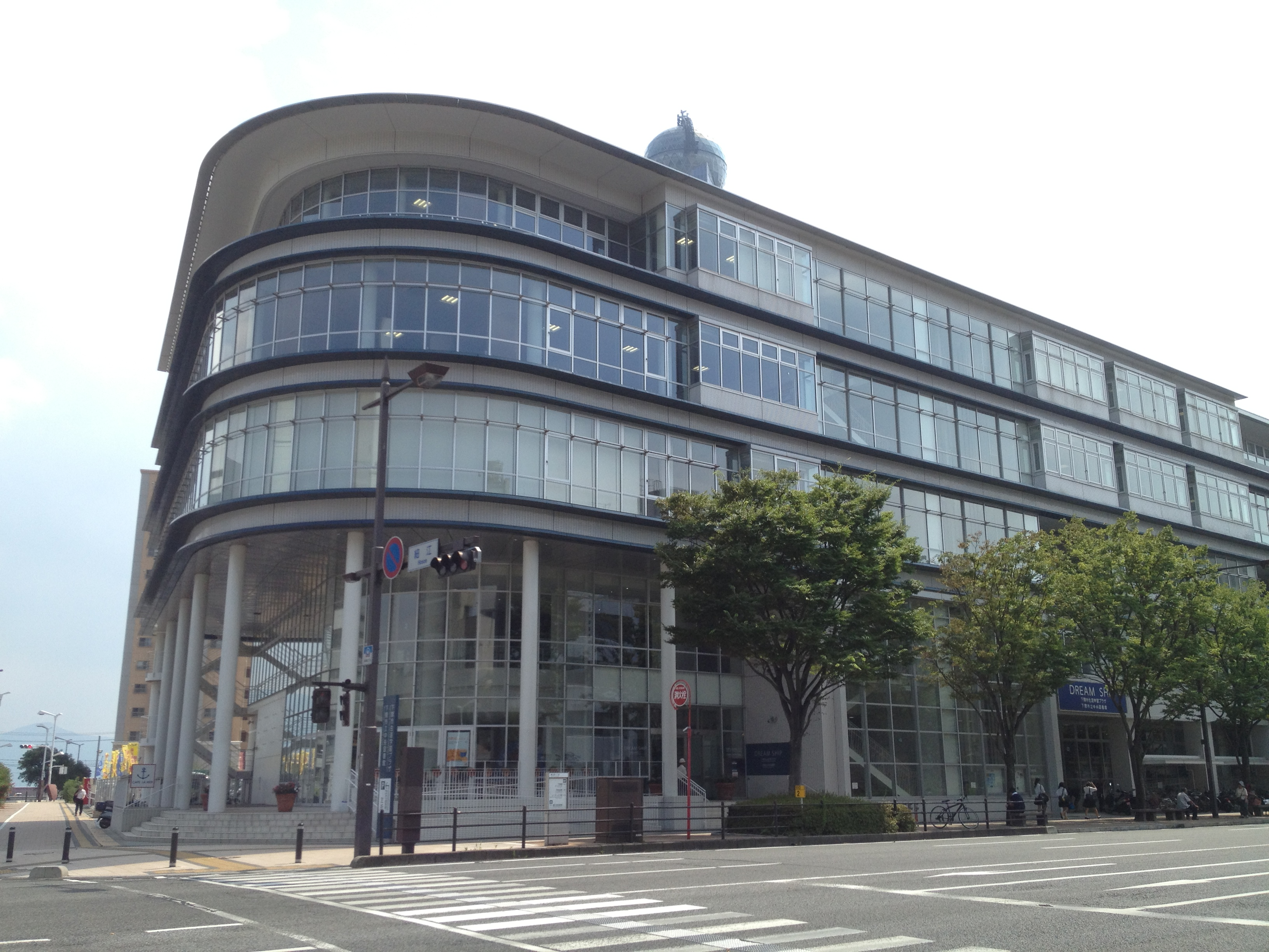 下関市生涯学習プラザドリームシップ。中央図書館、生涯学習施設機能、多目的ホール、式典等に活用できるホールを備えている。